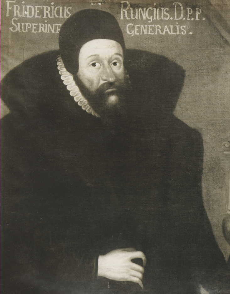 Bildnis Friedrich Runge (1559–1604), Theologe in Greifswals